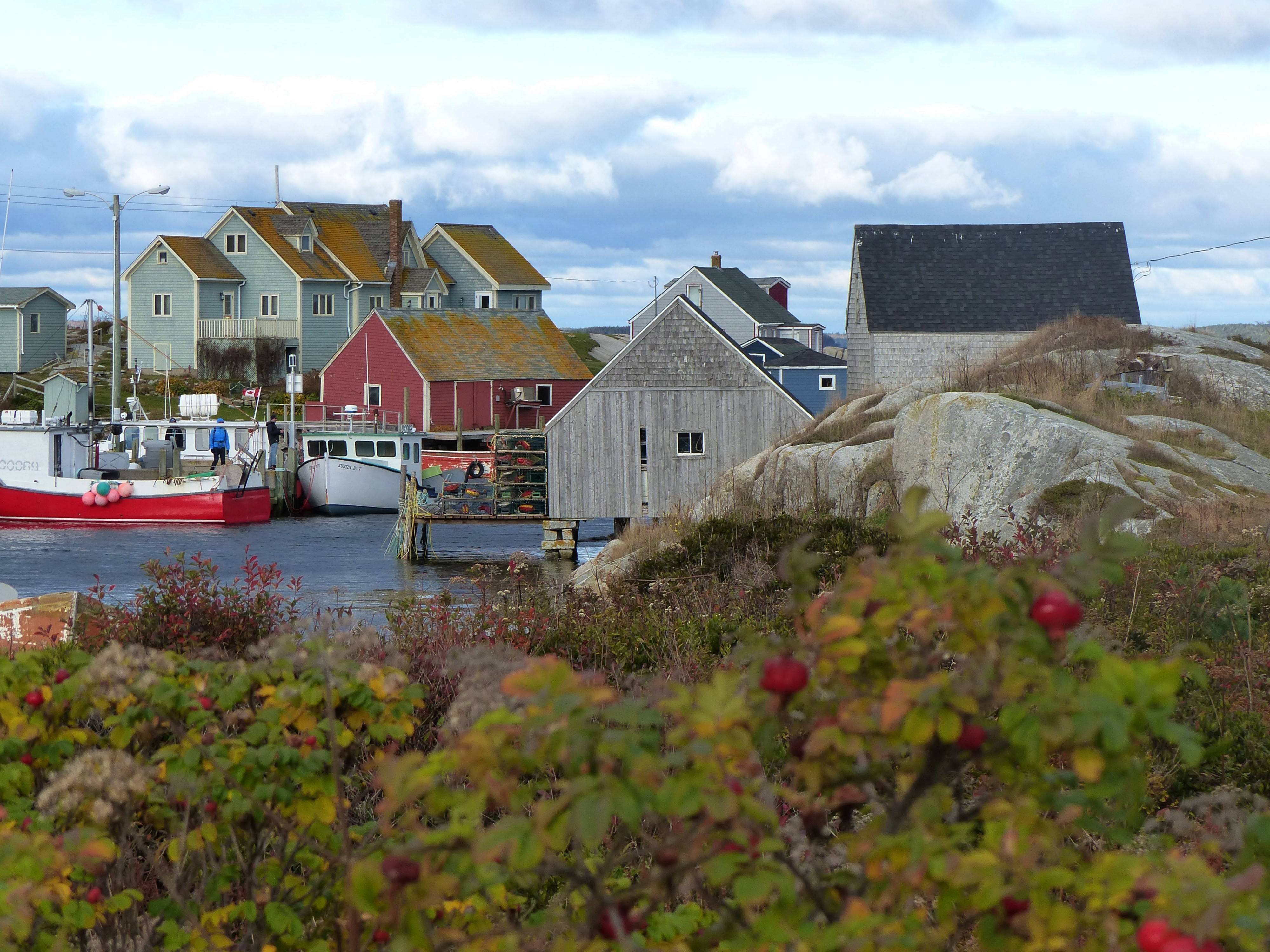 Halifax, NS, Canada